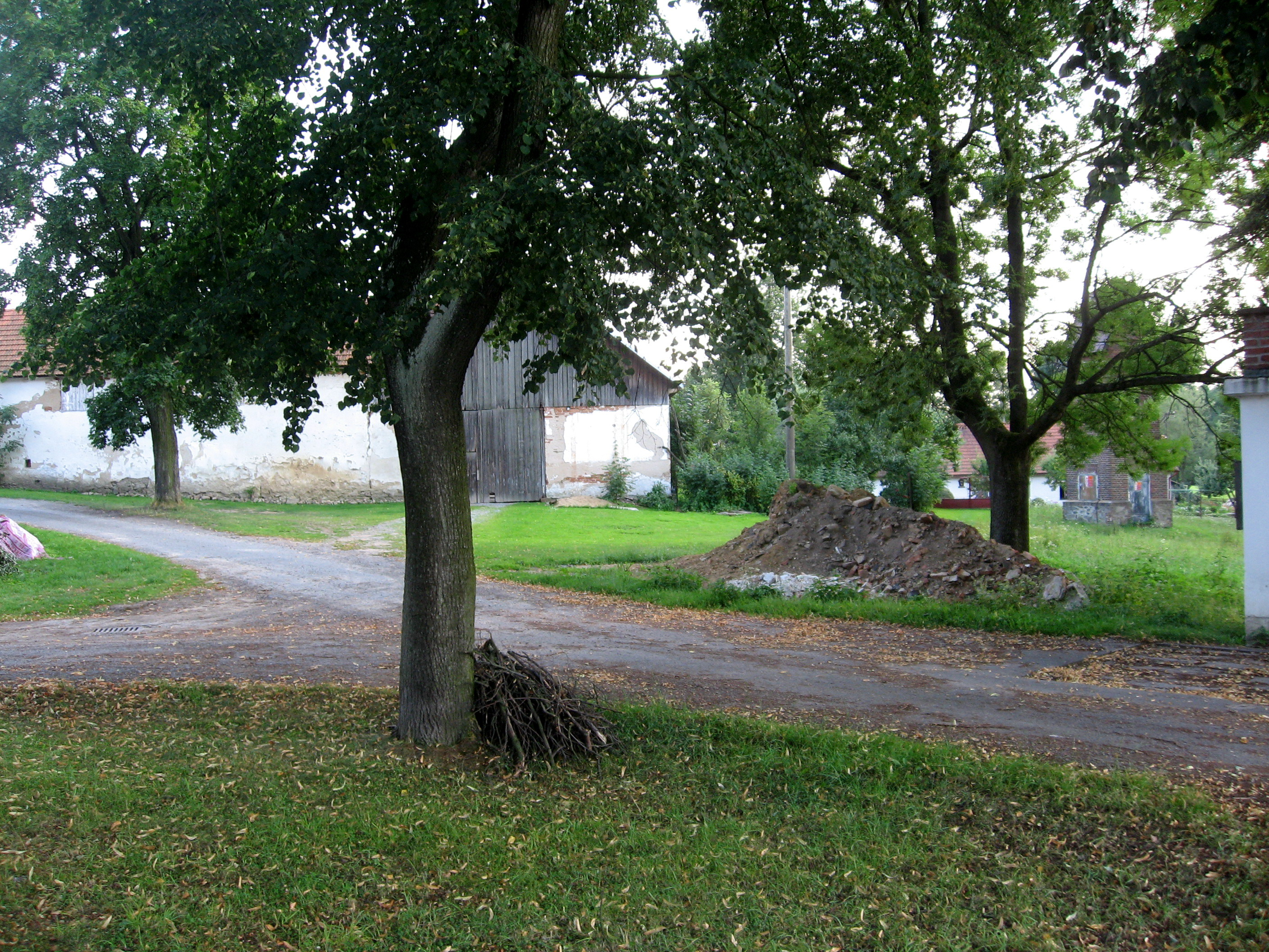 Onšovice